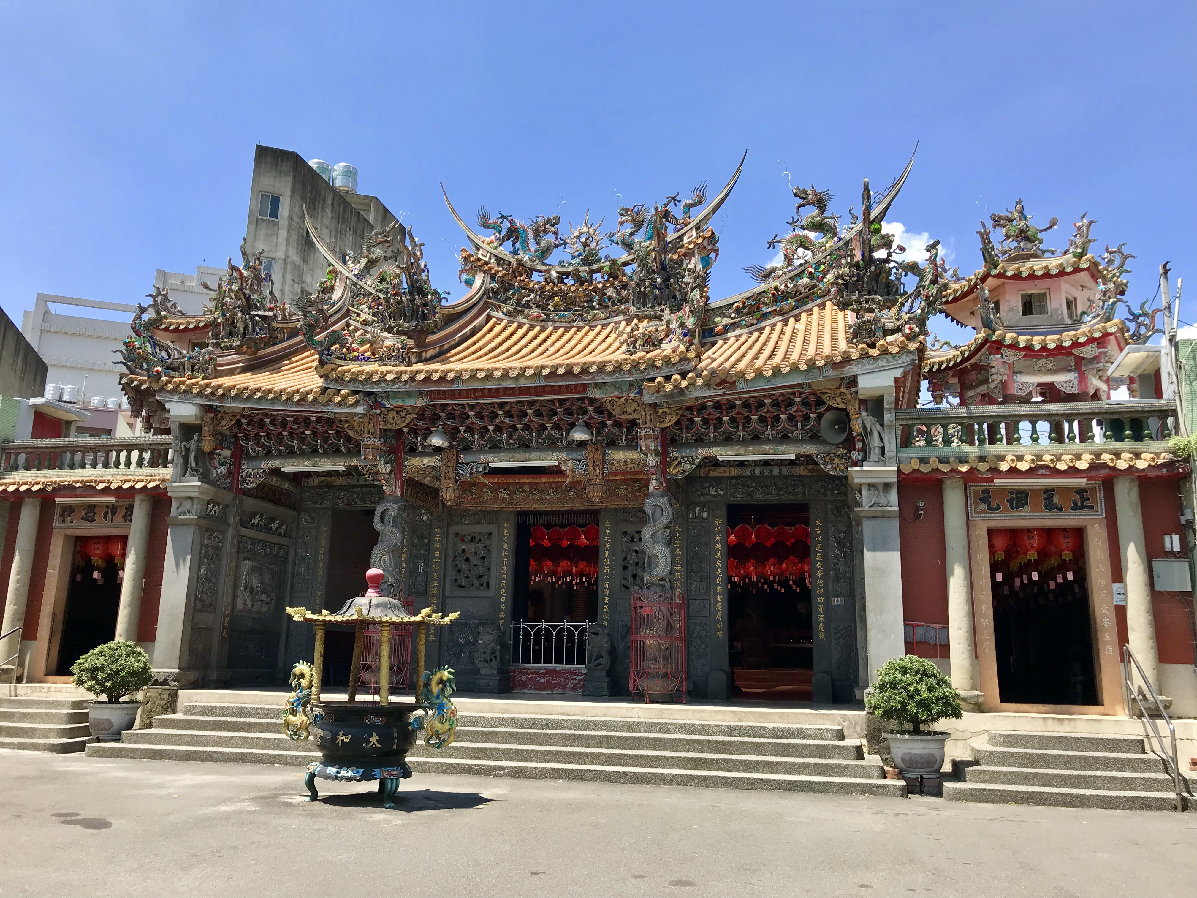 關西太和宮斜照